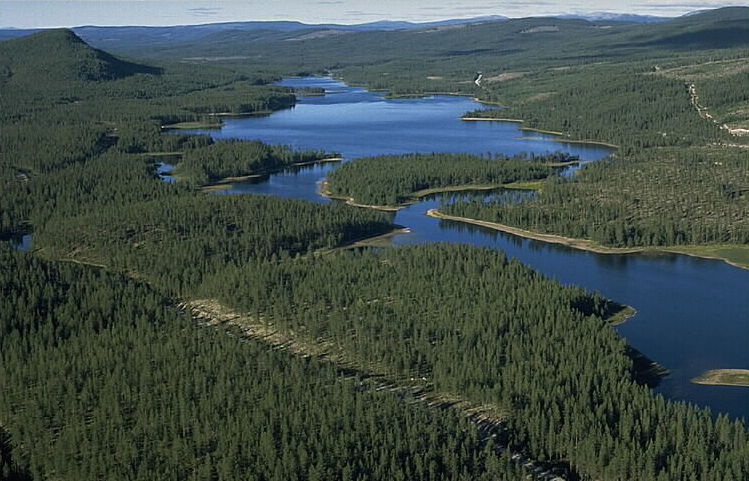 (Även i Vemdalens socken.) Motiv: Stavsjön Nyckelord: Flygbilder, Riksintressen Kategori: Insjömiljöer, Skogslandskap(Även i Vemdalens socken.).